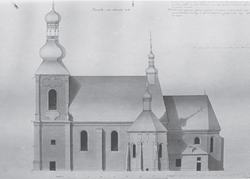 Беларуская (тарашкевіца): Бабруйск (Babrujsk), Фарны касьцёл